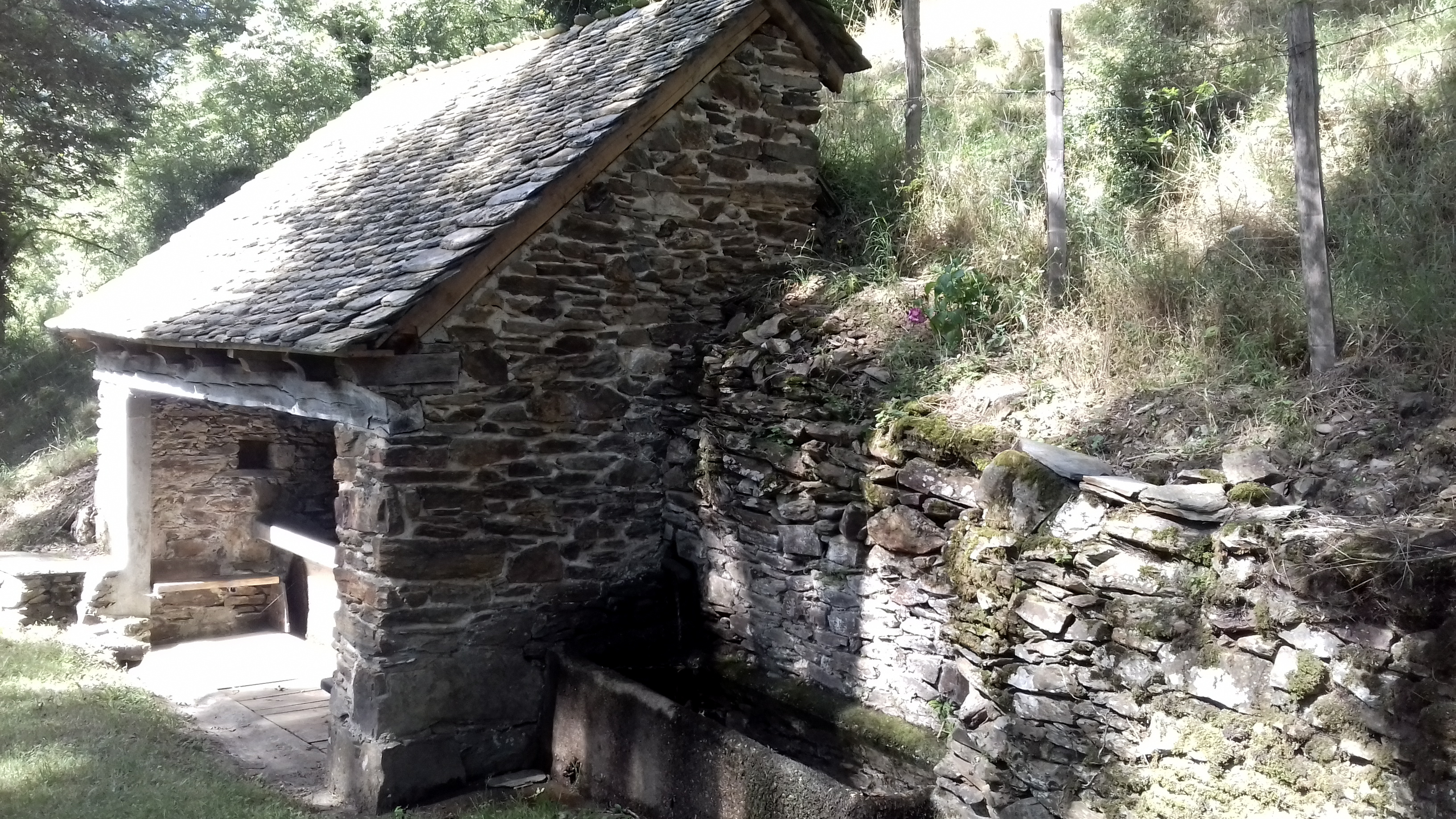 Lavoir "Fontaine basse".(1924). Pomayrols, Aveyron, France